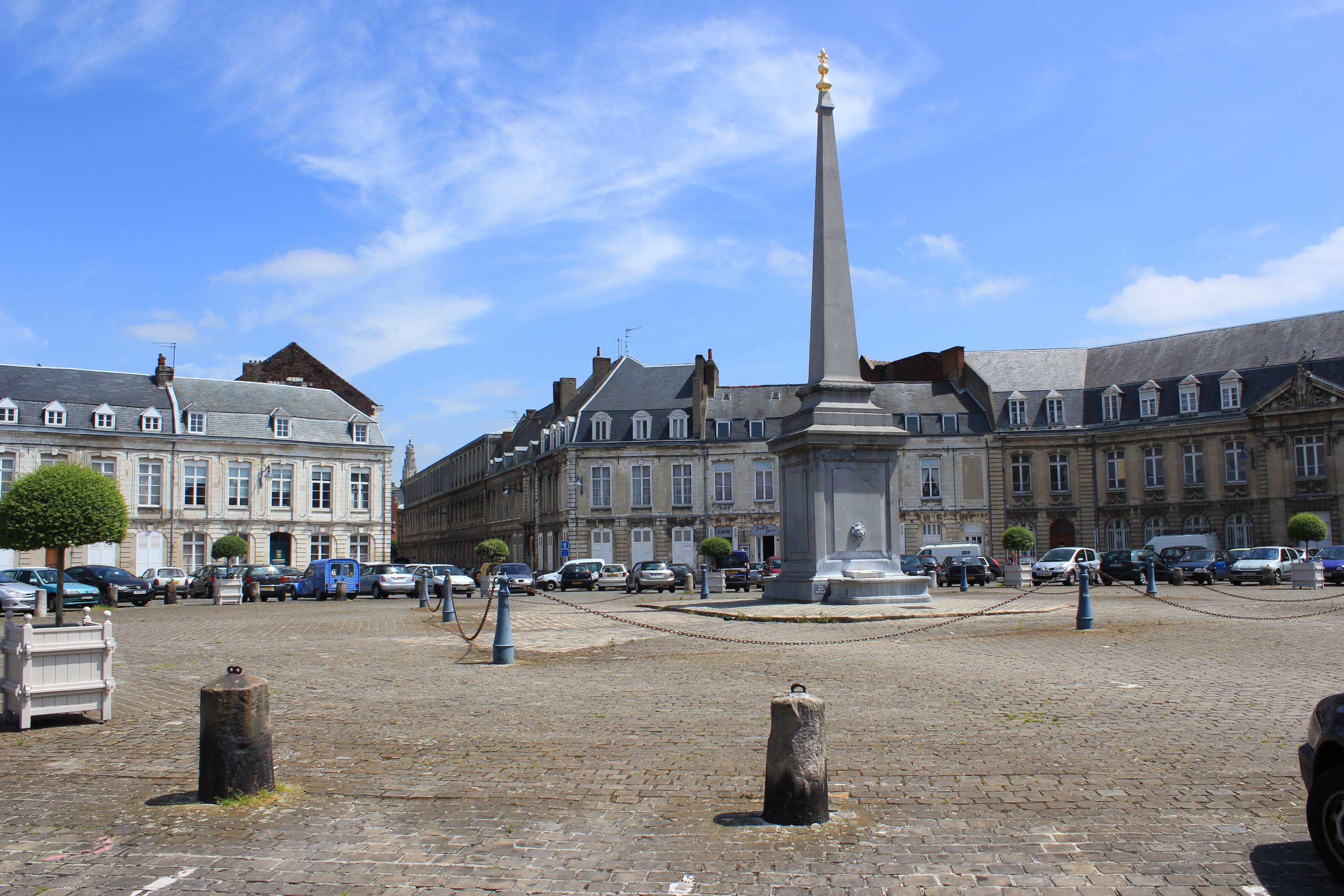 Arras (62) Place Victor Hugo